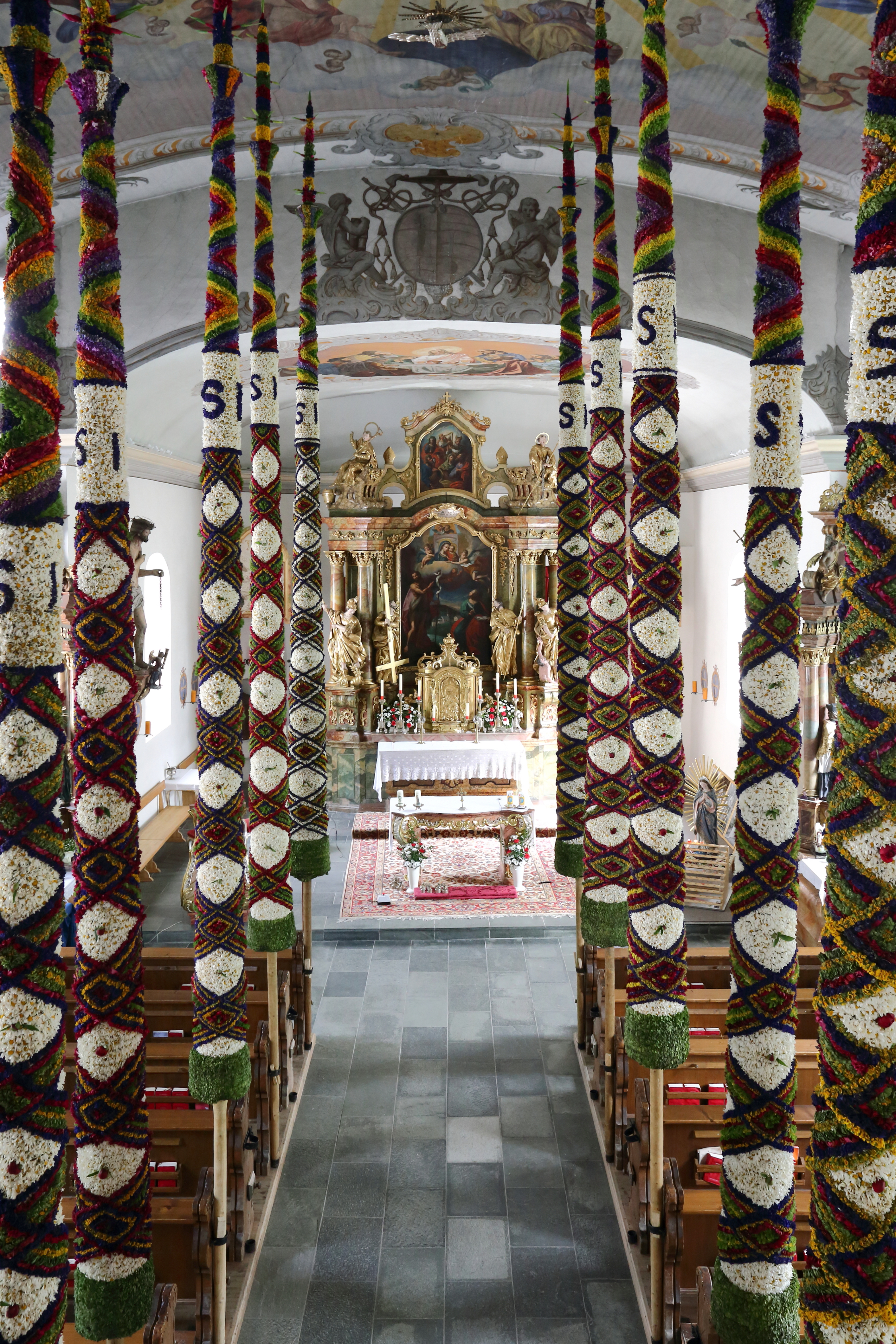 Prangstangen in der Pfarrkirche der Salzburger Gemeinde Zederhaus.